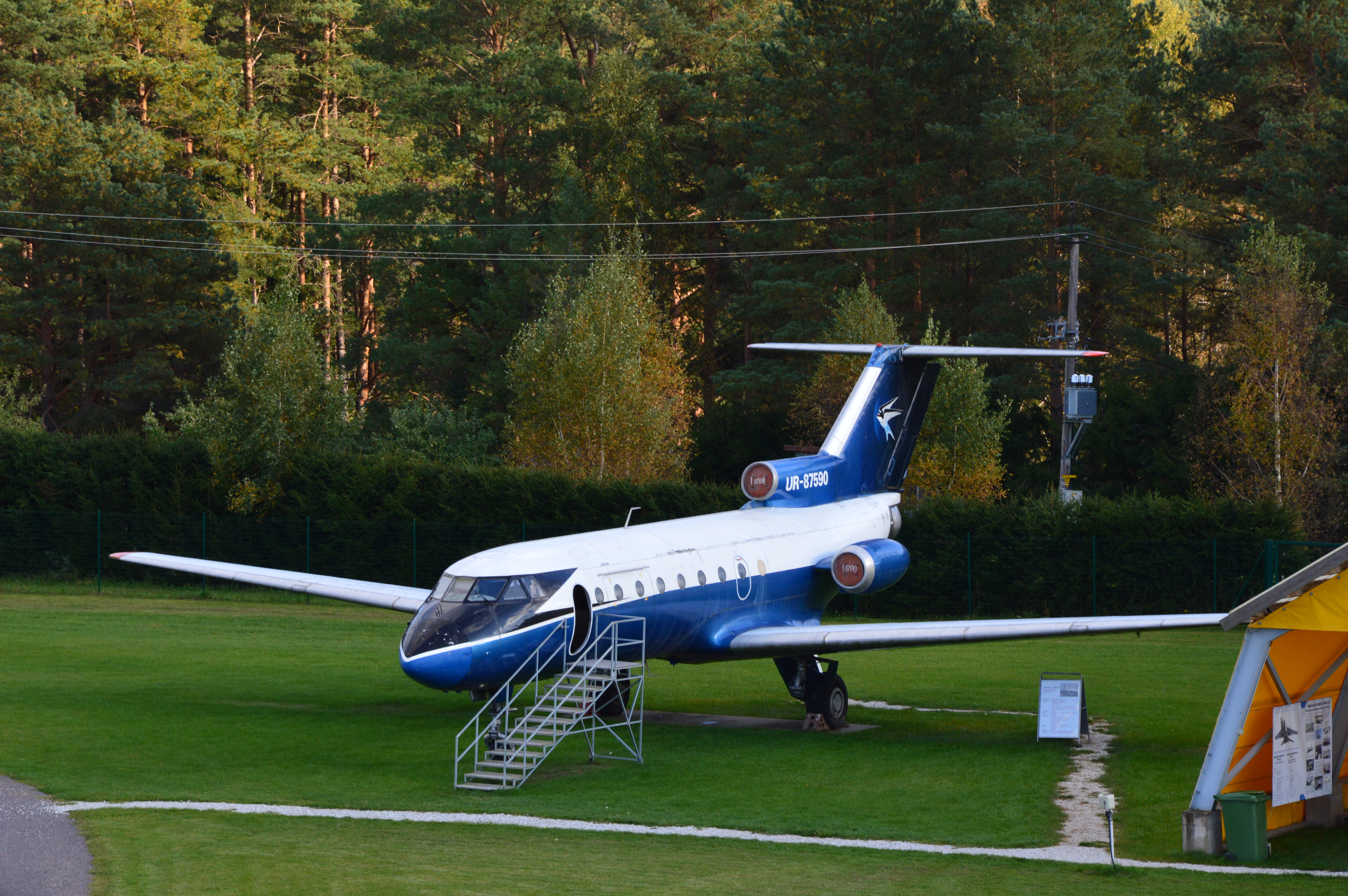 Jakovlev Jak-40 Eesti Lennundusmuuseumis.